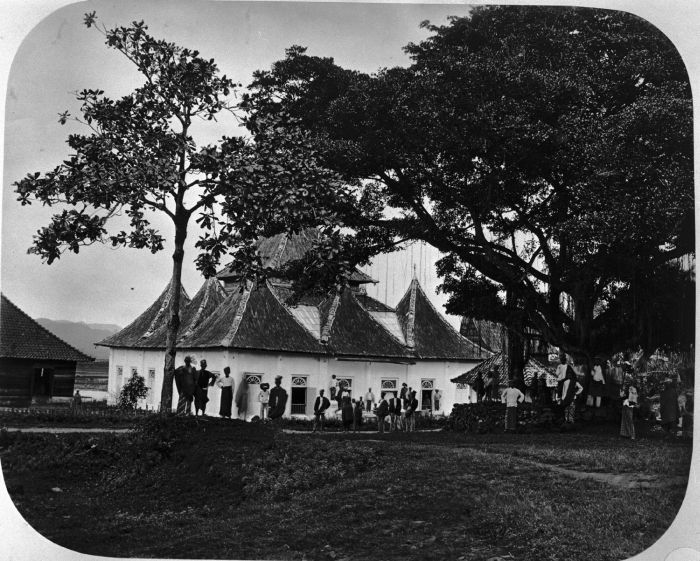 Foto. De moskee te Kotagedang nabij Fort de Kock, Sumatra.